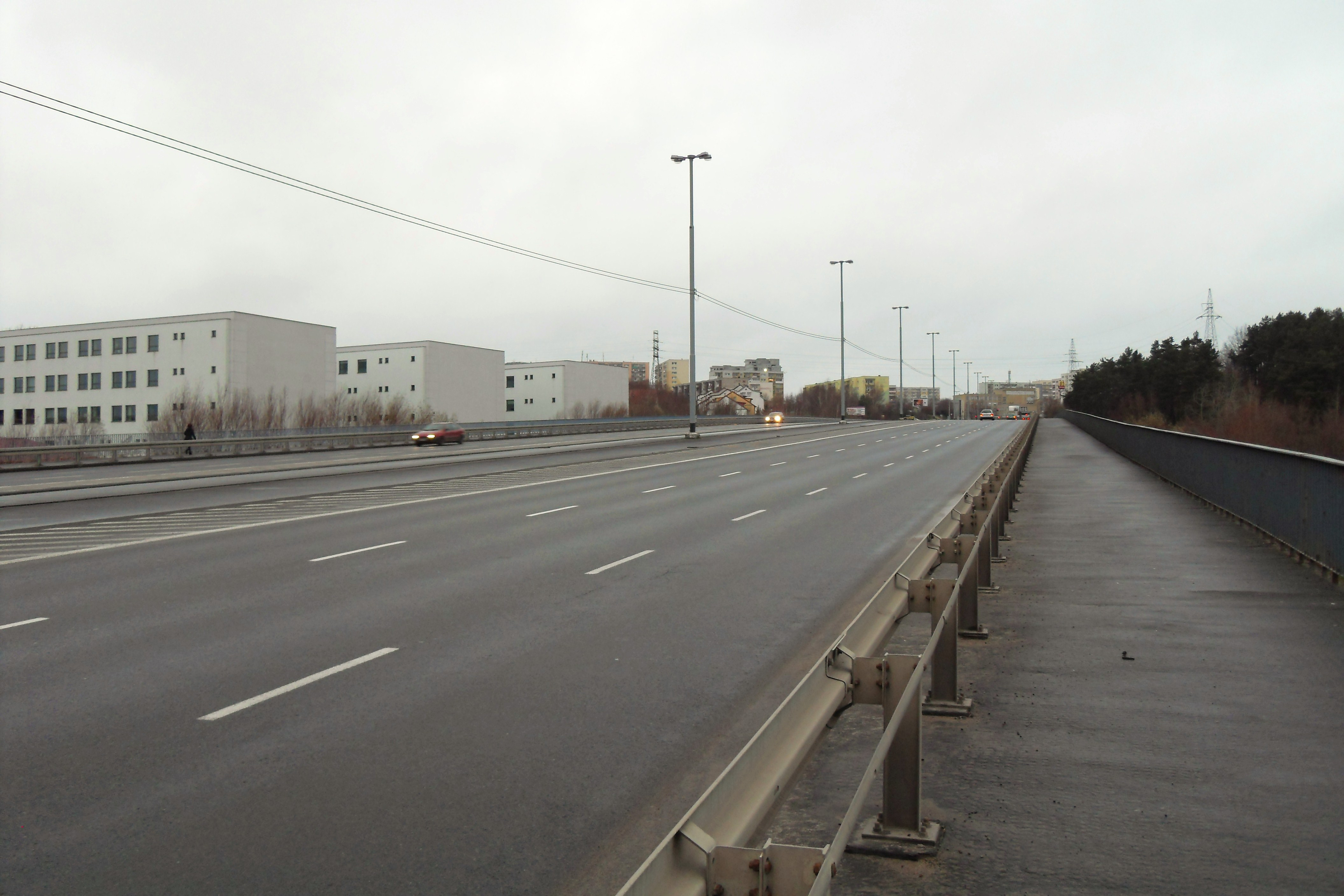 Gdańsk Piecki-Migowo, ul. Rakoczego - estakada.